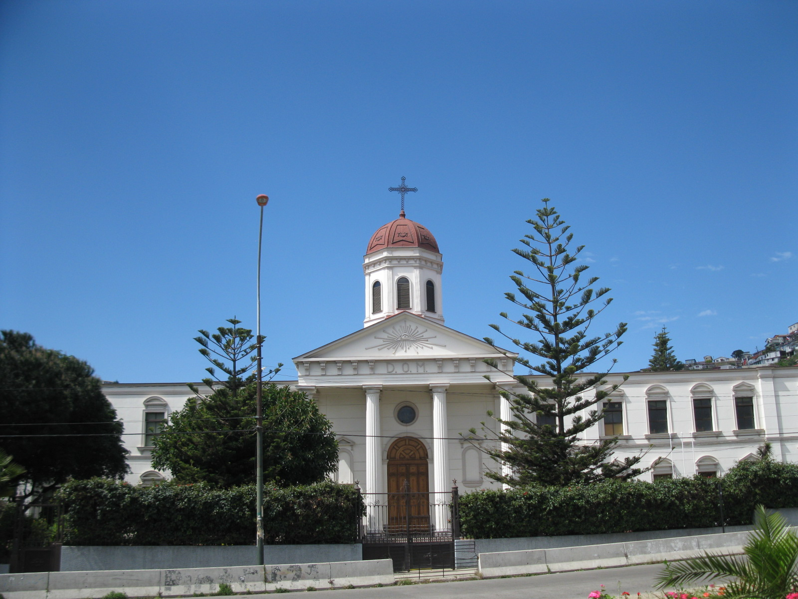 Vista del frontis de la Iglesia Asilo del Salvador. This is a photo of a national monument in Chile: 581